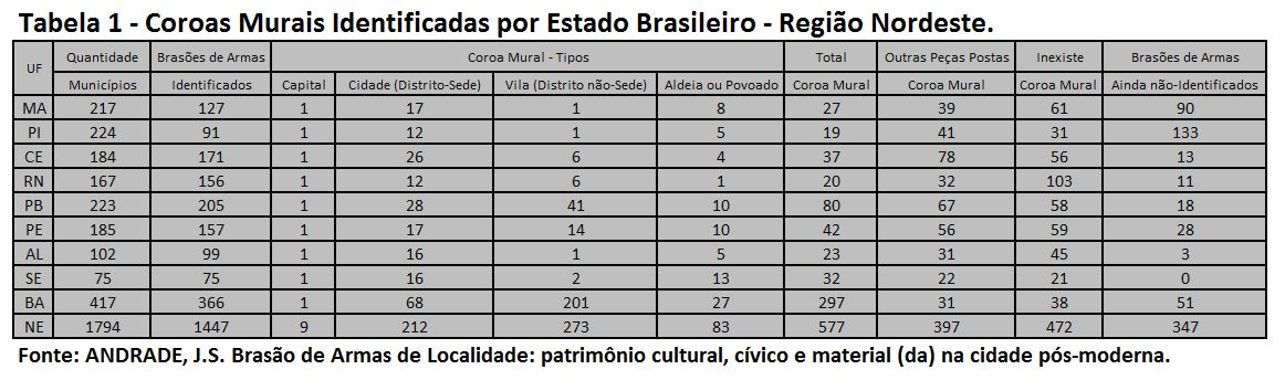 Quadro Demonstrativo dos Tipos de Coroas Murais identificadas no Brasil por Estados.